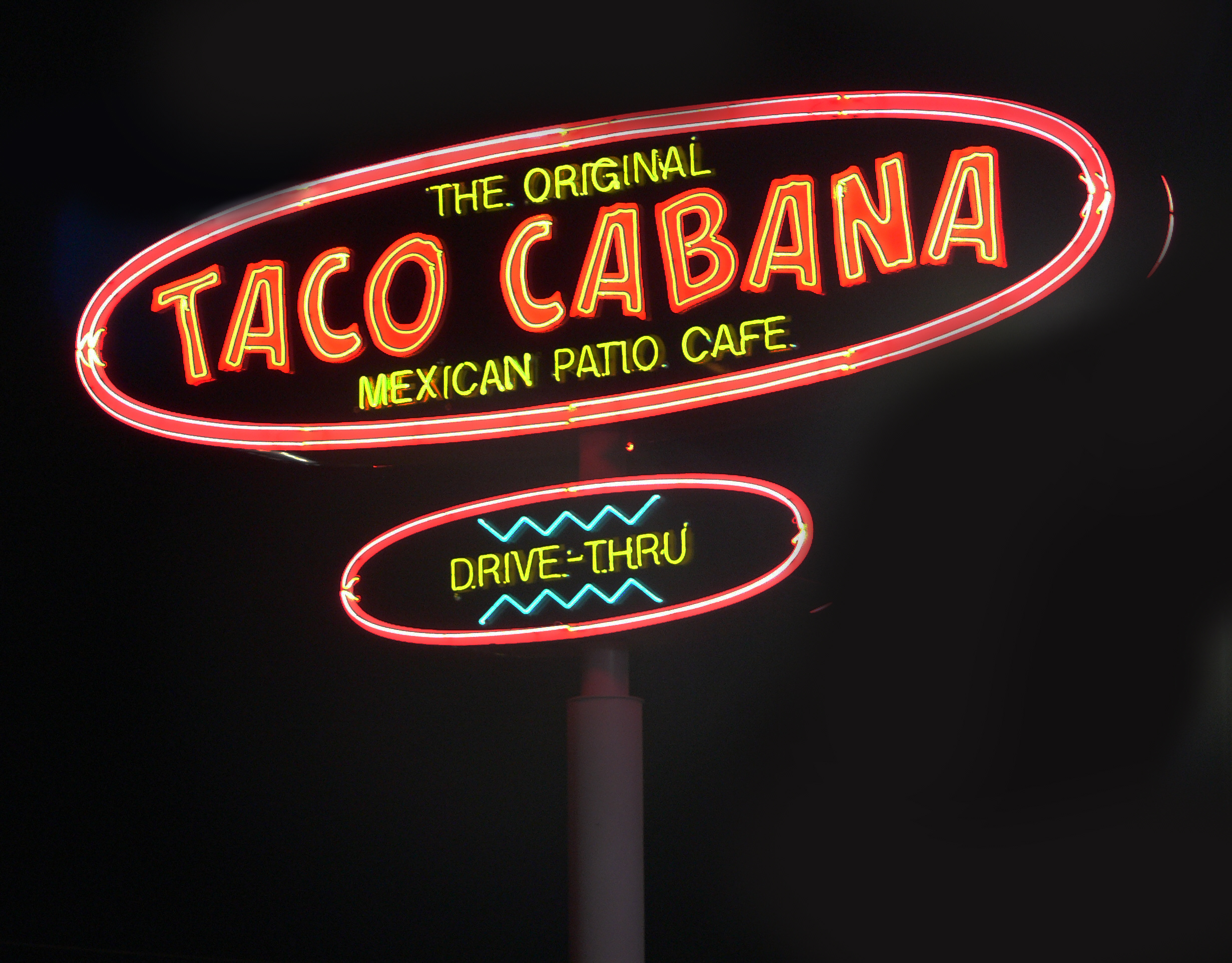 Taco Cabana restaurant in Dallas, Texas